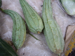 有稜的絲瓜